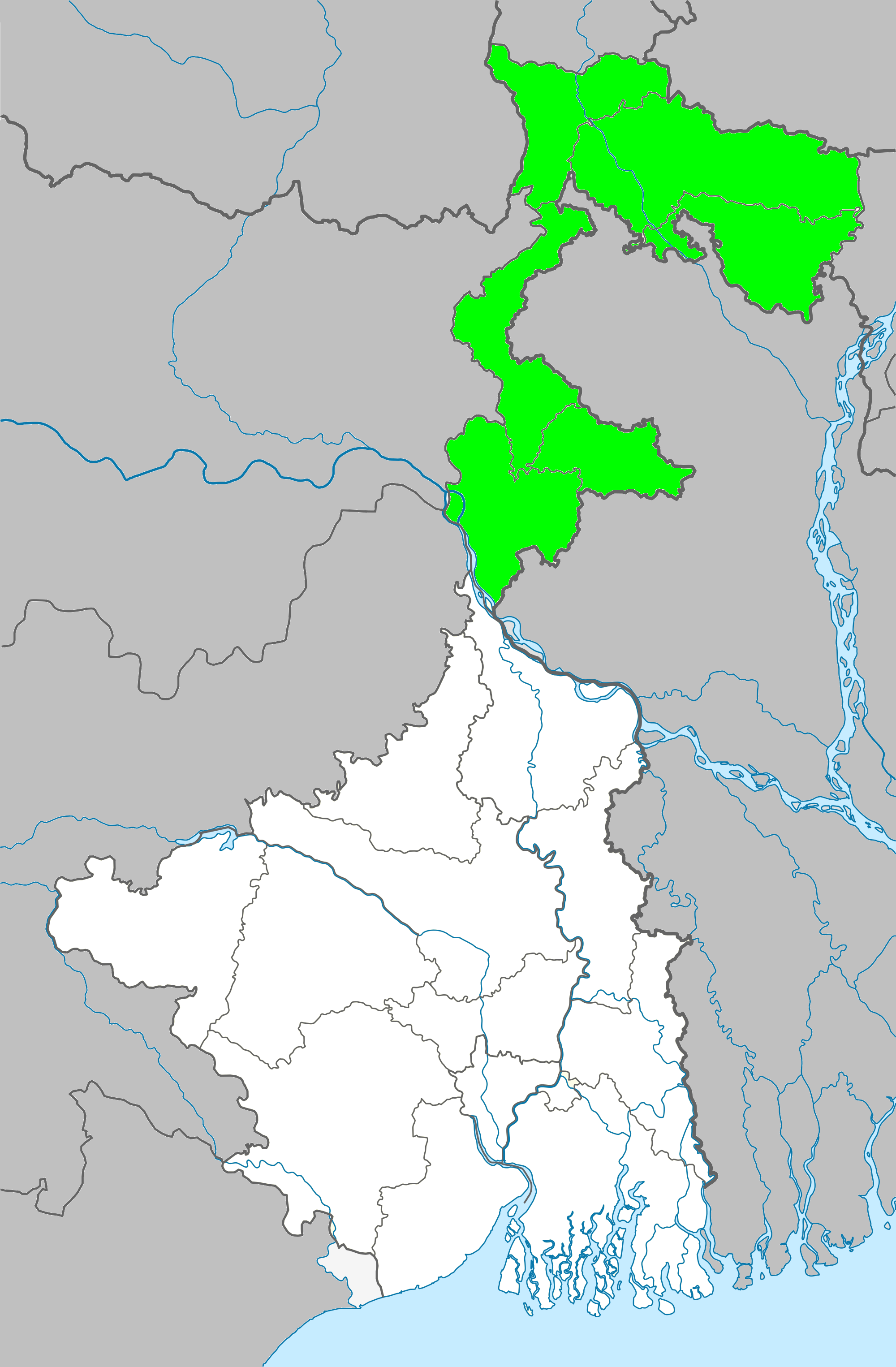 পশ্চিমবঙ্গের উত্তরবঙ্গ